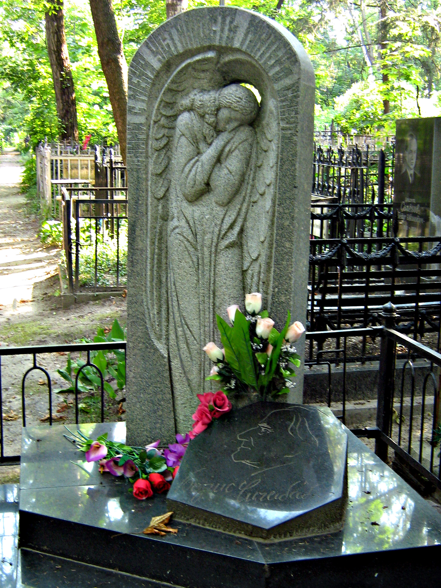 Памятник Борису Чичибабину на втором мемориальном кладбище в Харькове. Ул. Пушкинская.